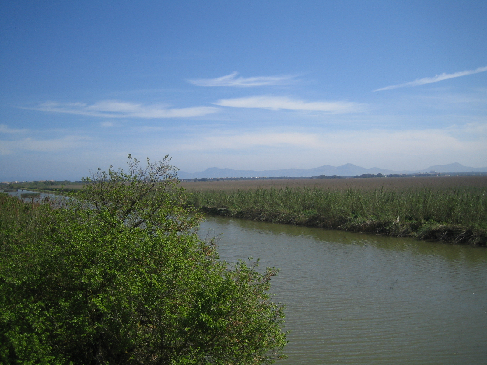 Vogelschutzgebiet Albufera